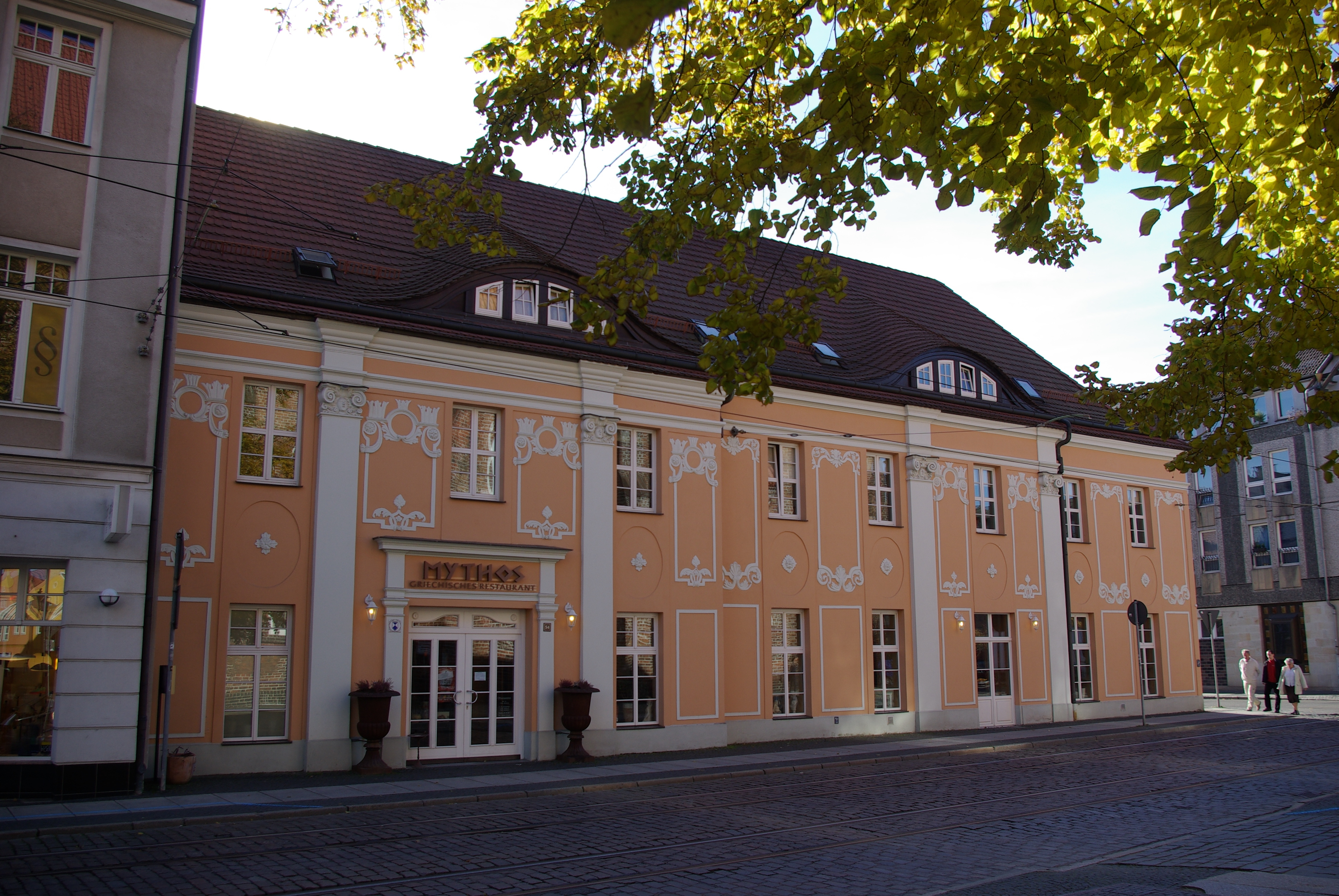 Cottbus in Brandenburg. Das Haus in der Sandower Straße 54 steht unter Denkmalschutz.